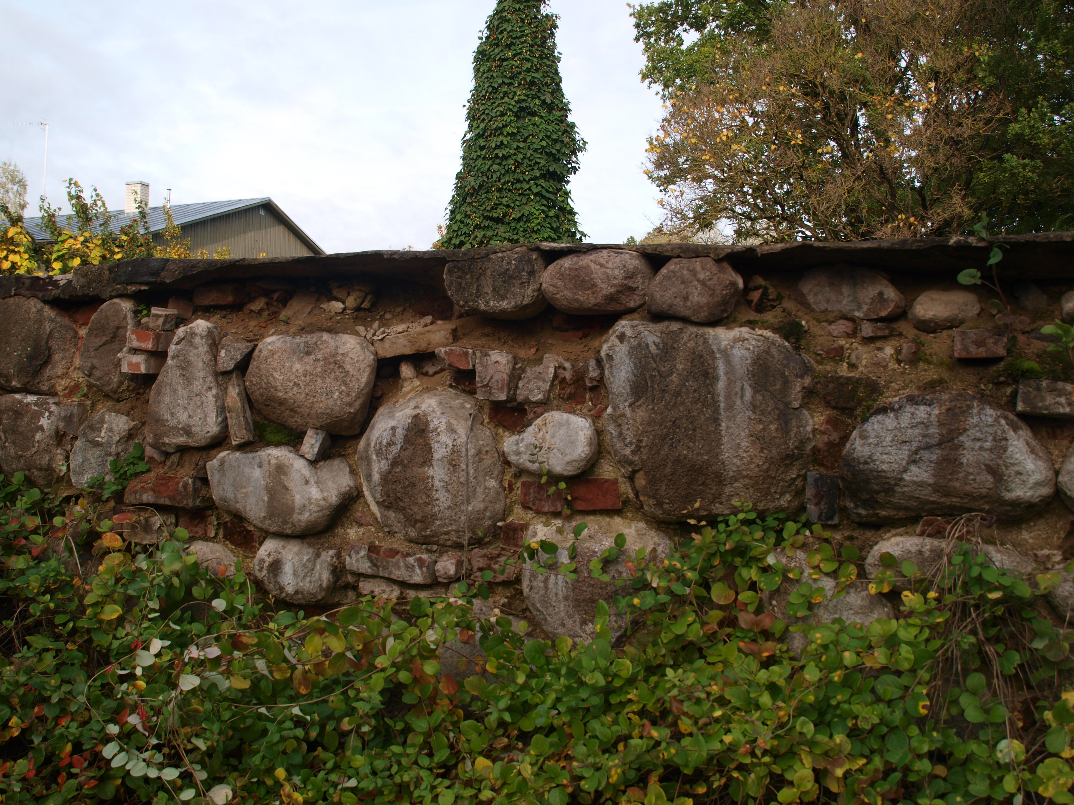 Tartu linnamüüri säilmed 2,13-15.saj. Tartu botaanikaaias